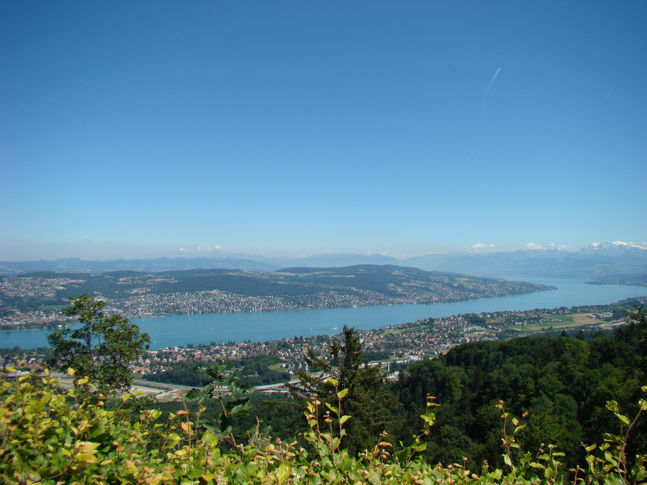 Zürichsee mit Blick Richtung Zürcher Oberland und Glarner Alpen von der Terrasse des Hotels Uto Kulm aus zu sehen